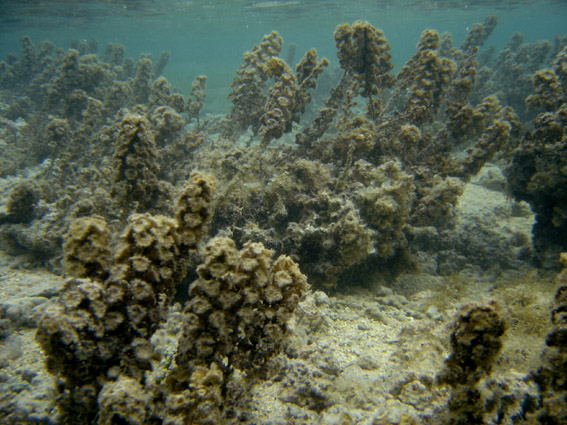 Turbinaria_ornata a brown alga: World Register of Marine Species link: Turbinaria ornata J. Ag. NCBI link: Turbinaria ornata